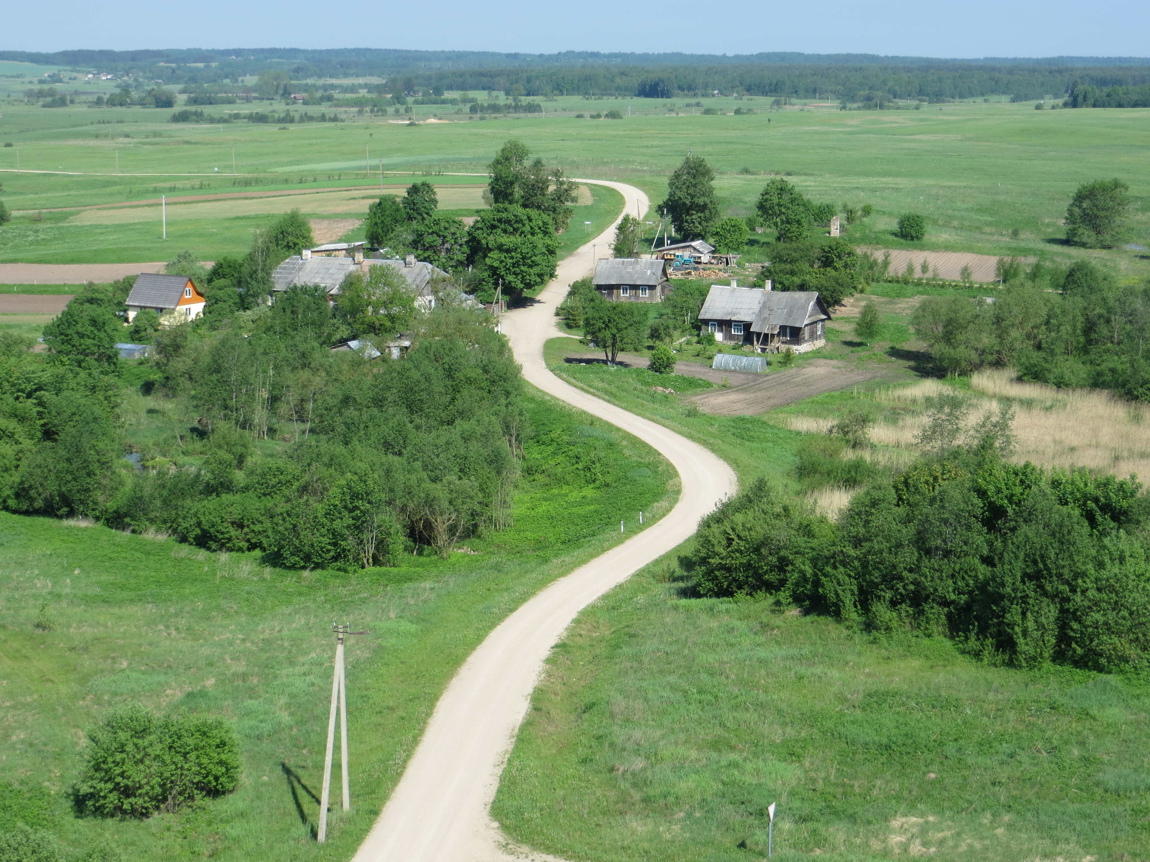 Pakryžė 15164, Lithuania